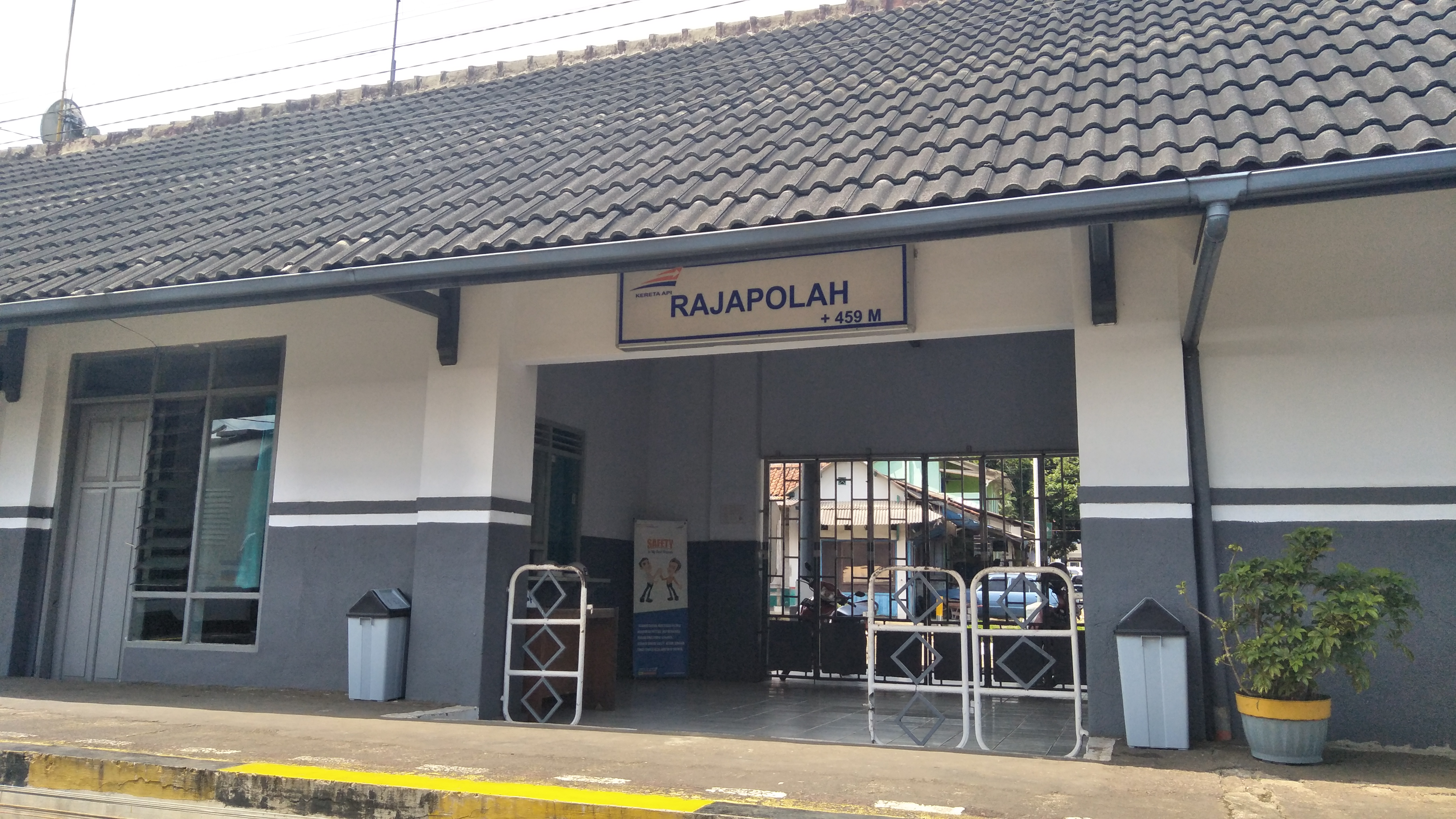 Gambar stasiun Rajapolah